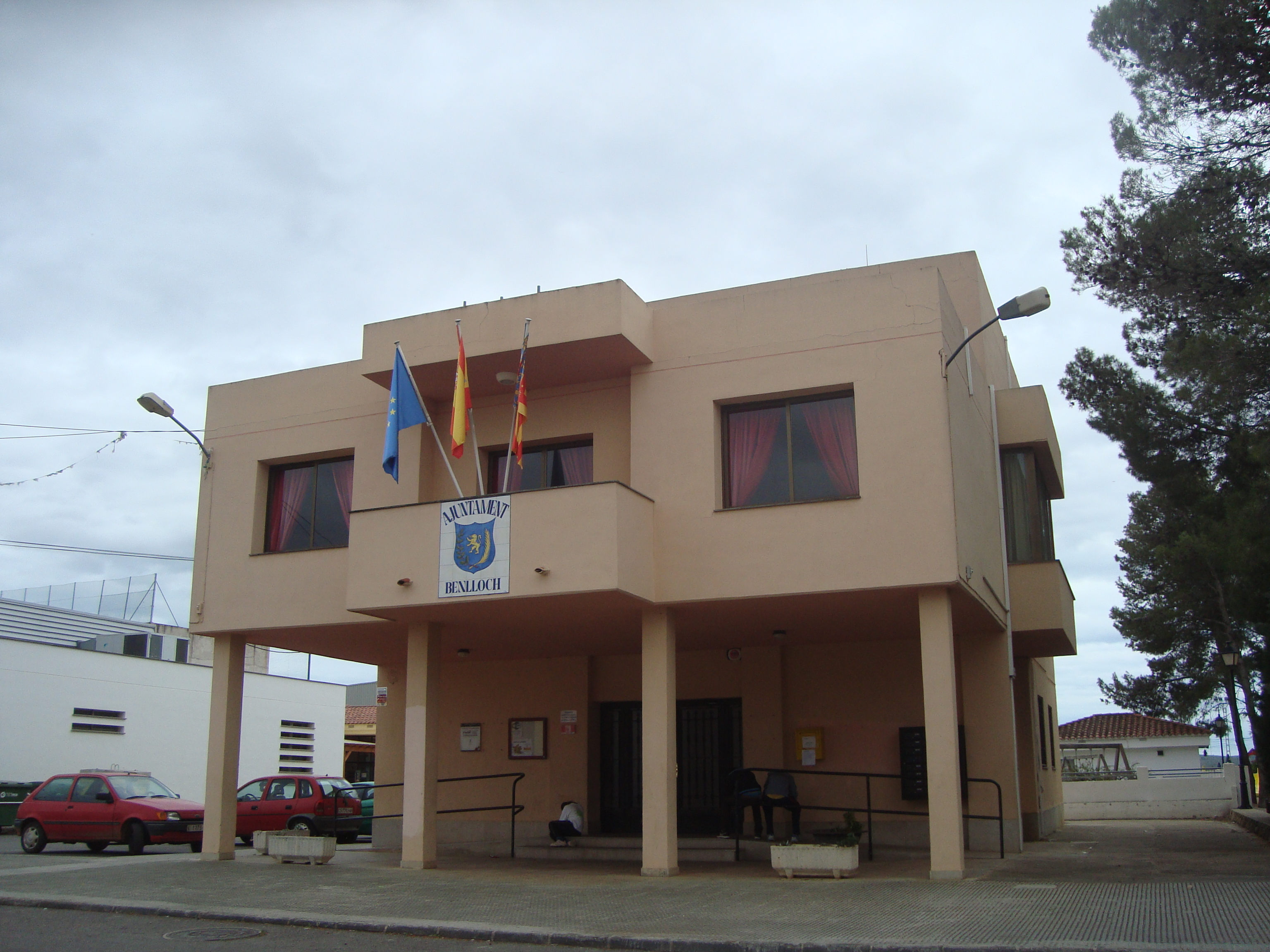 Ayuntamiento de Benlloch